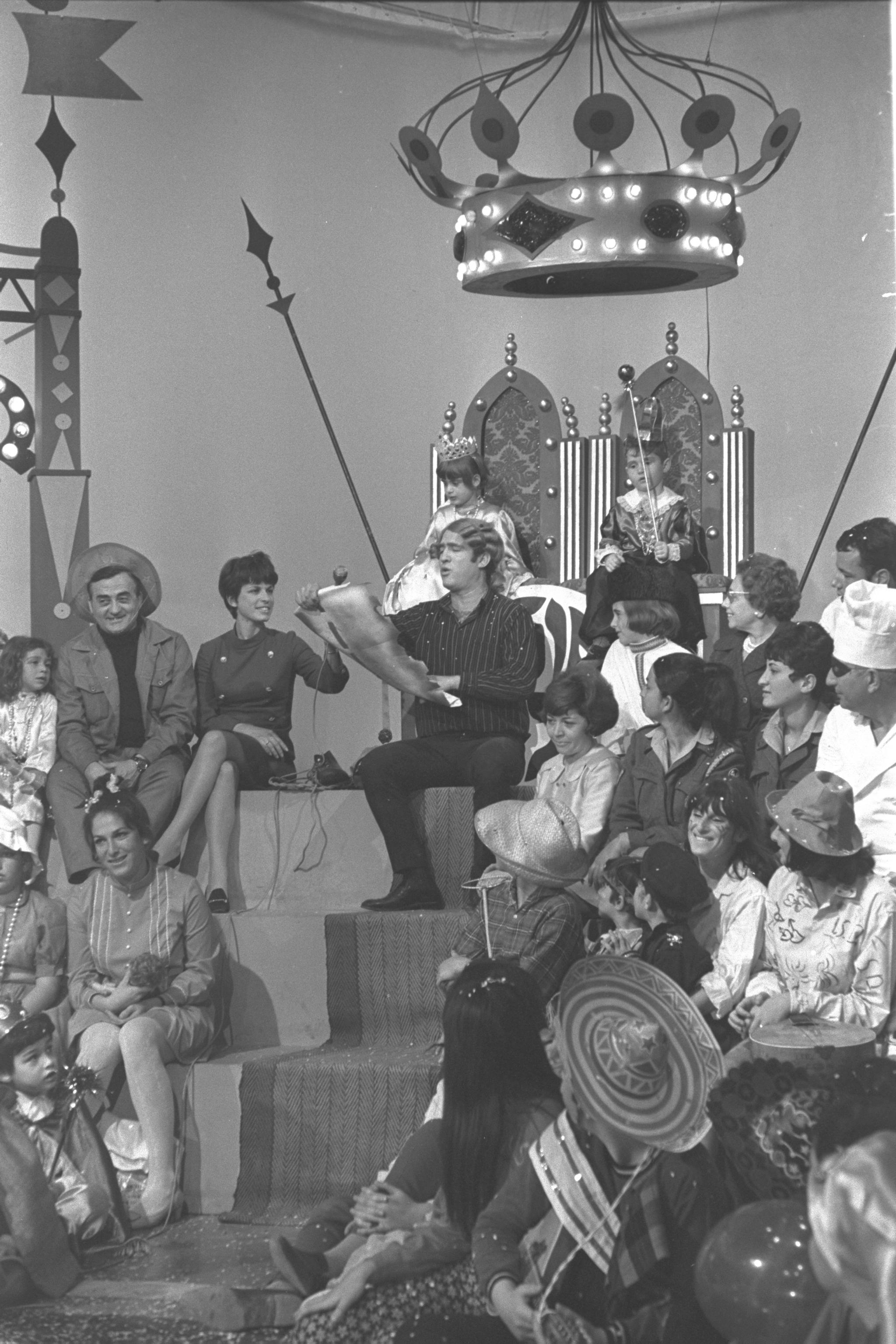 Entertainer Yoram Gaon in the Purim special of TV program of Ulpan Agol יהורם גאון בתוכנית מיוחדת לפורים של אולפן עגול